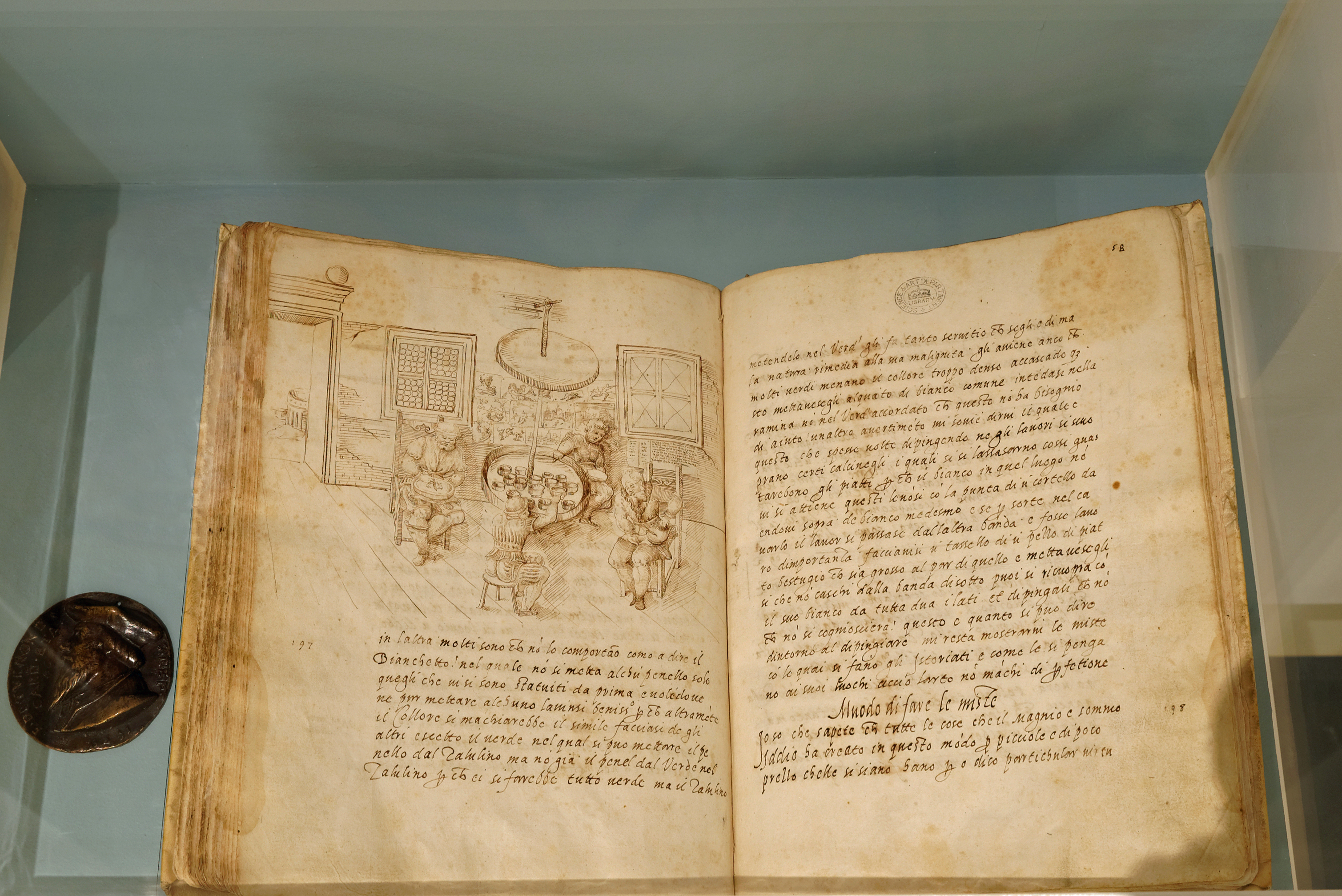 Cipriano Piccolpasso - Li Tre libri dell’arte del vasaio